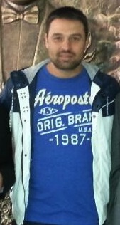 Fatih akyel okulda verdiği röportaj sonrası